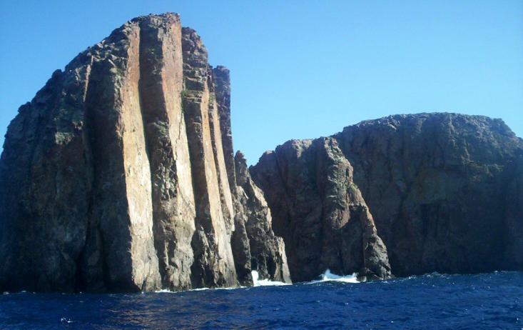 Cape Vani